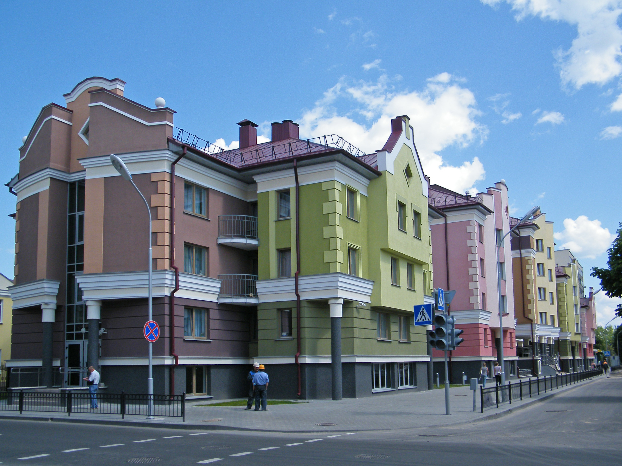 Общежитие Полеского Государсвенного Университета